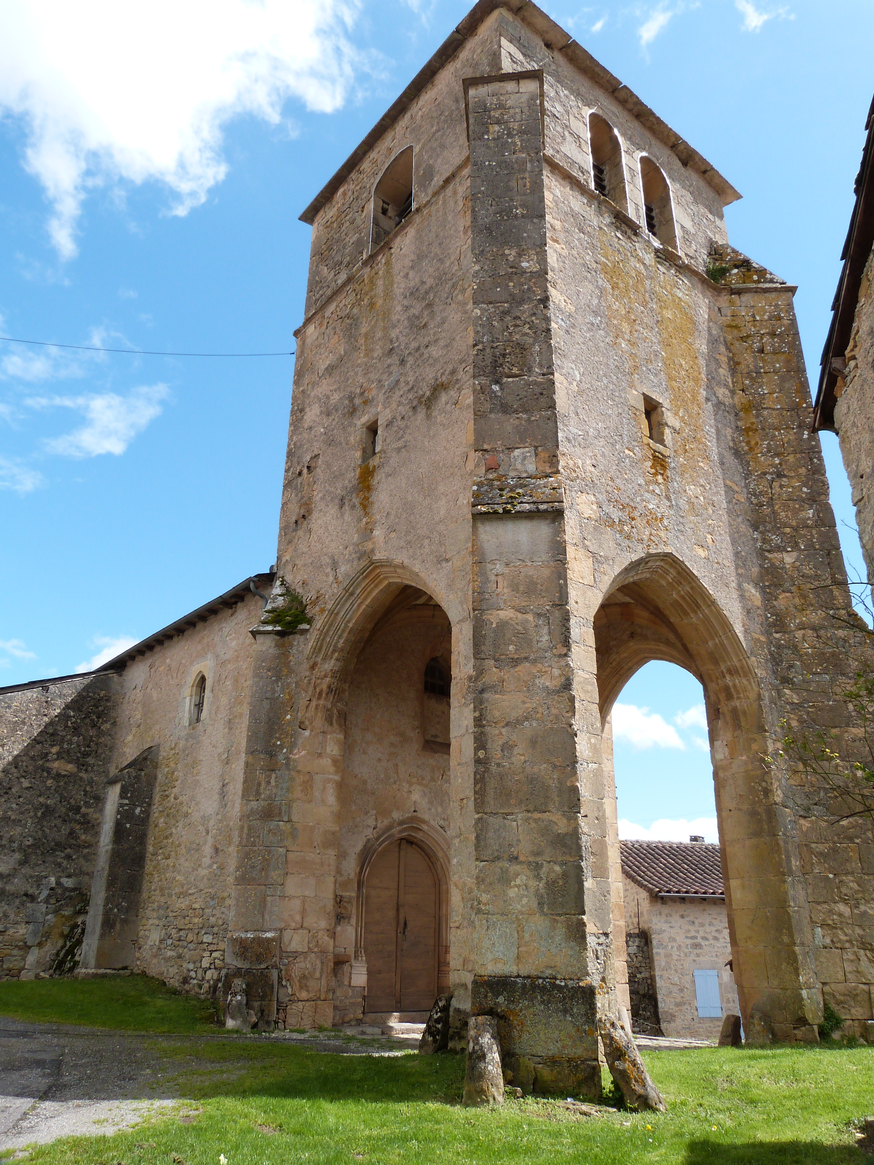 Ce clocher-porche de l'église Saint-Michelde Toulonjac rappelle celui de la collégiale de Villefranche-de-Rouergue